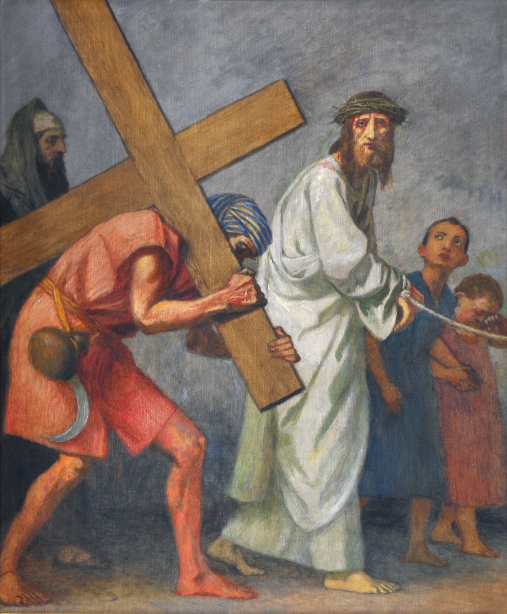 Leutkirch im Allgäu, Katholische Stadtpfarrkirche St. Martin, Kreuzweg von Gebhard Fugel, 1936, 5. Station, Öl auf Leinbwand, 124 x 104 cm